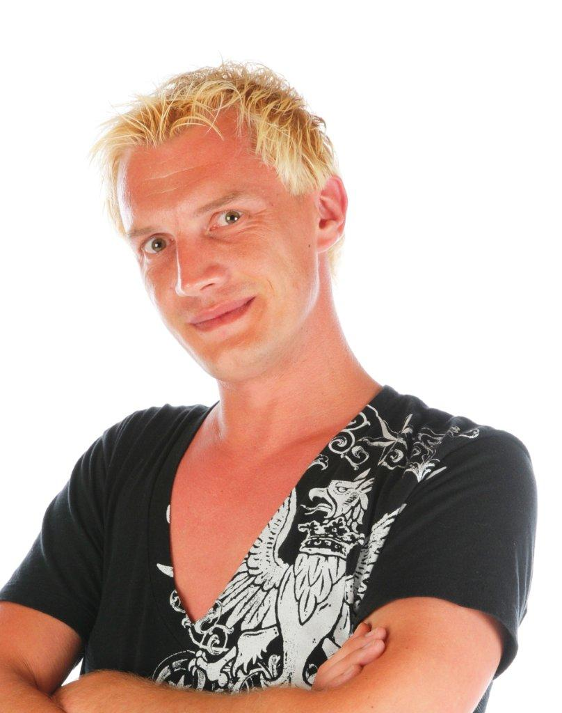 Portret van Martijn van Nellestijn, Nederlands acteur en regisseur.